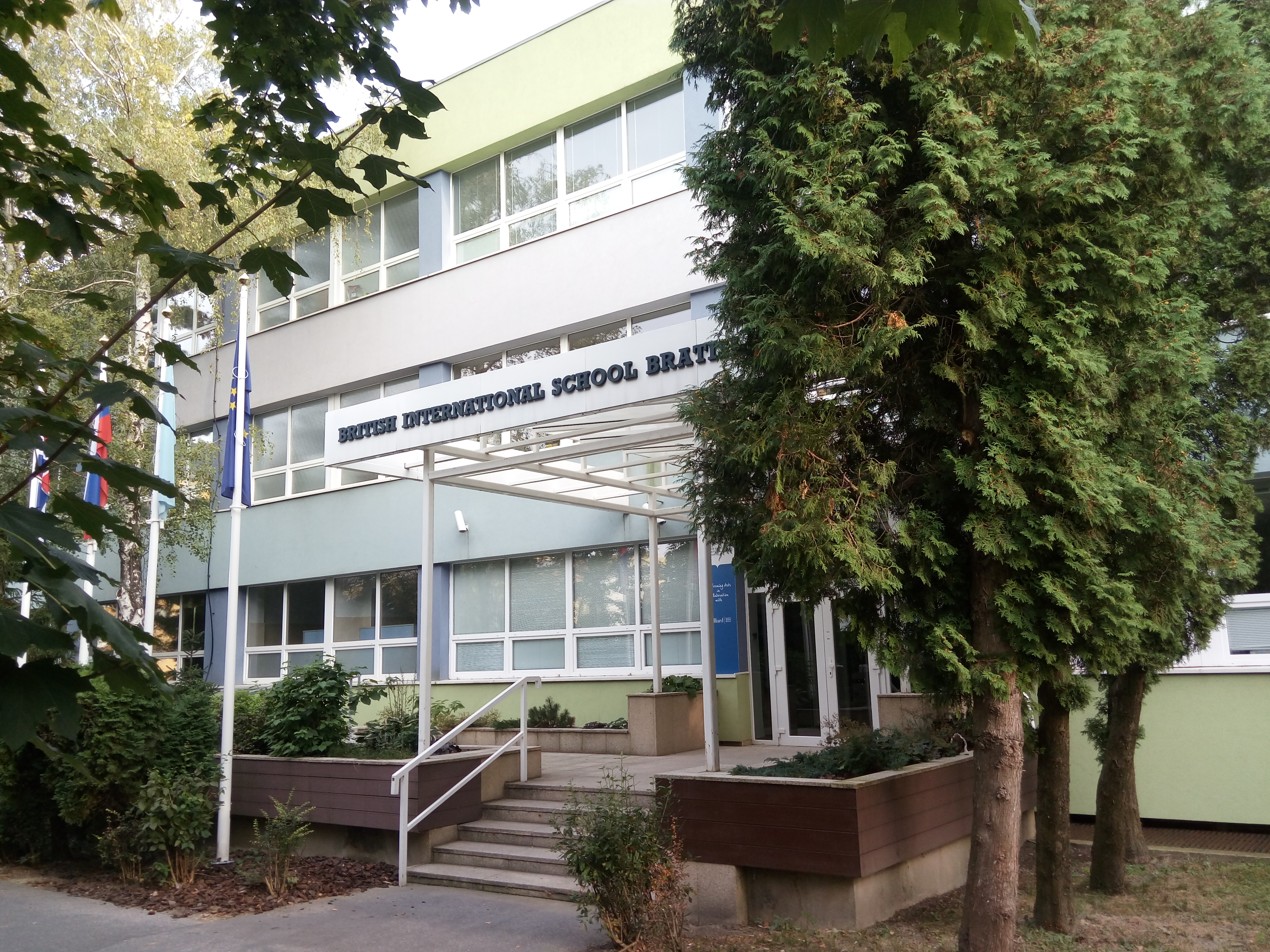 Pekníkova 6, Dúbravka, Bratislava